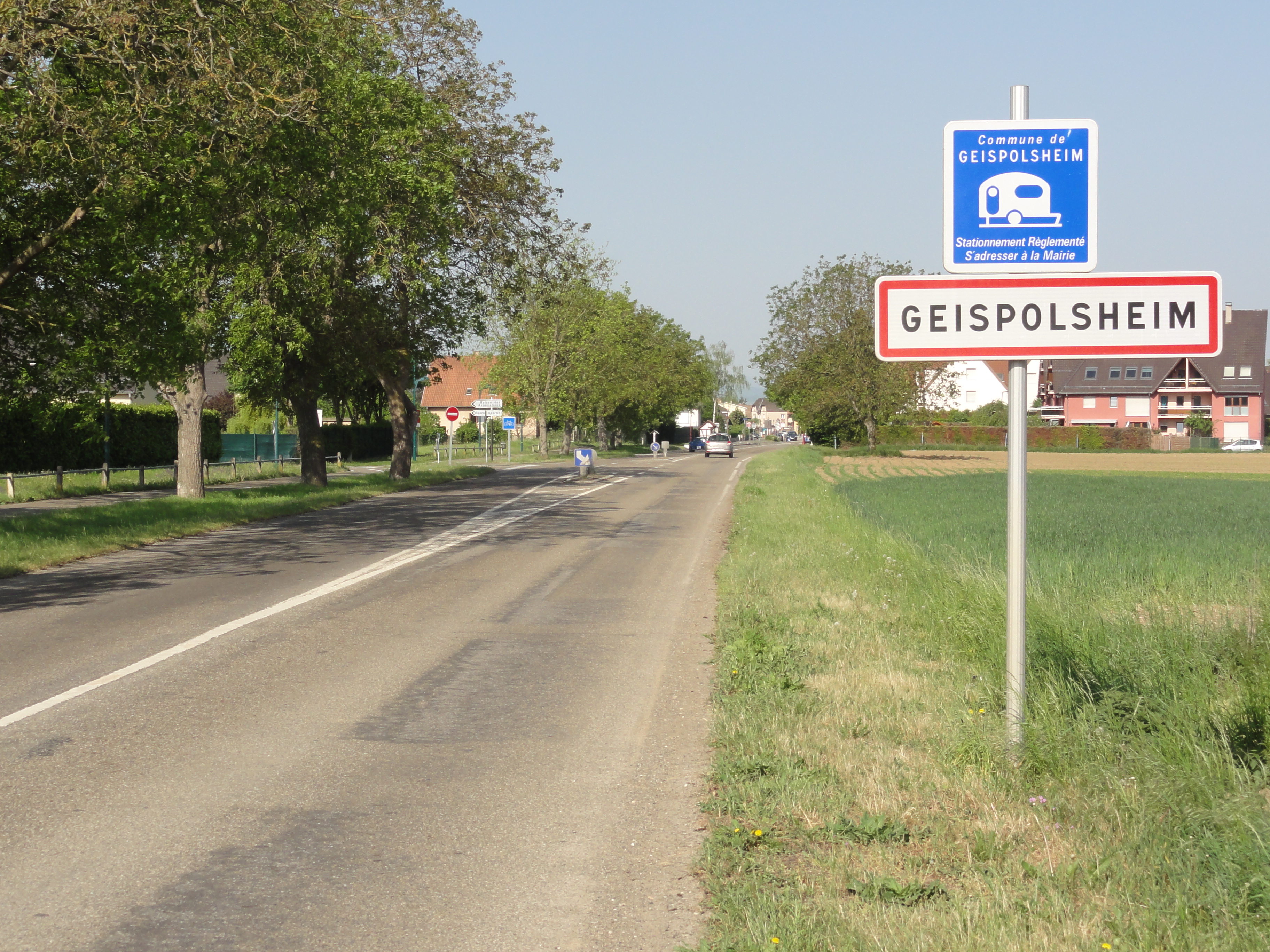 Geispolsheim (Bas-Rhin) city limit sign